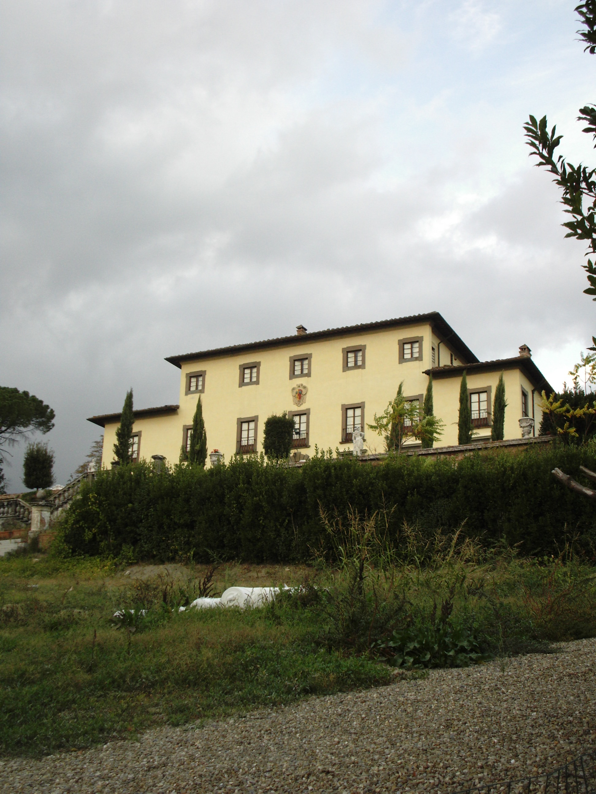 Villa di Cambiano, comune di Castelfiorentino, Prov. di Firenze